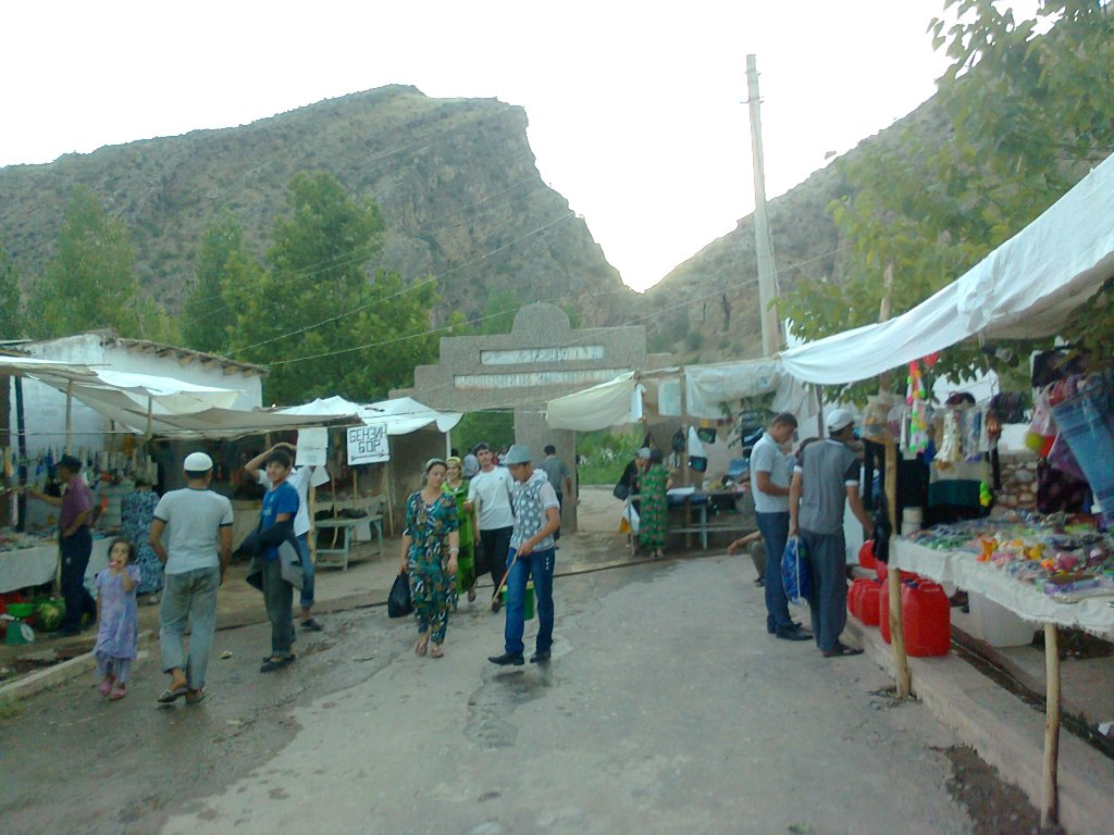 Хужайпок Маскани - это достопримечательность Южной части Узбекистана (Сурхандарьинская область) у подножьях гор и целебным источником. Базарчик у подножье Худжайпока.